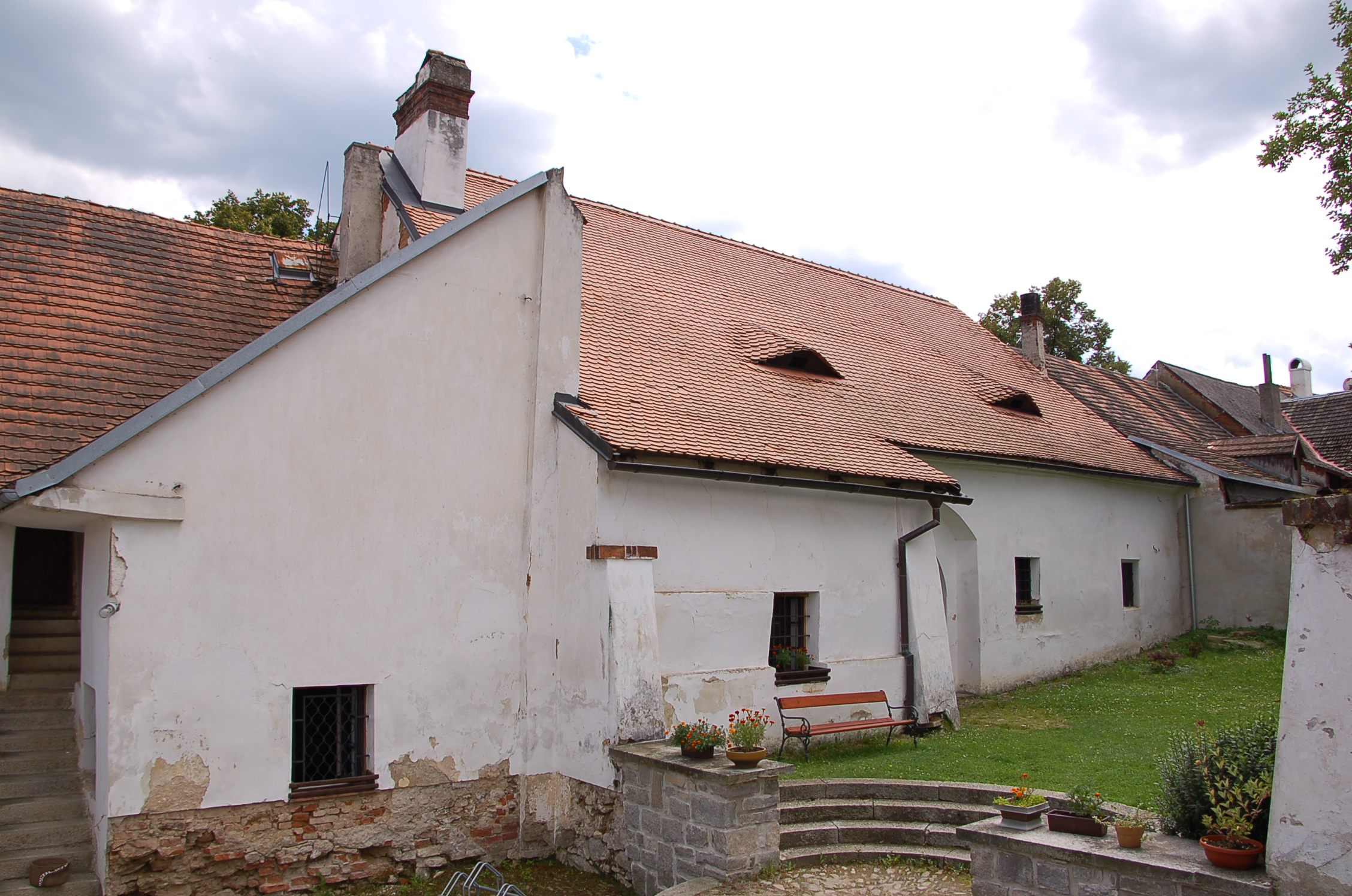 Jan Hus: Innenhof des Hus-Hauses in Husinec